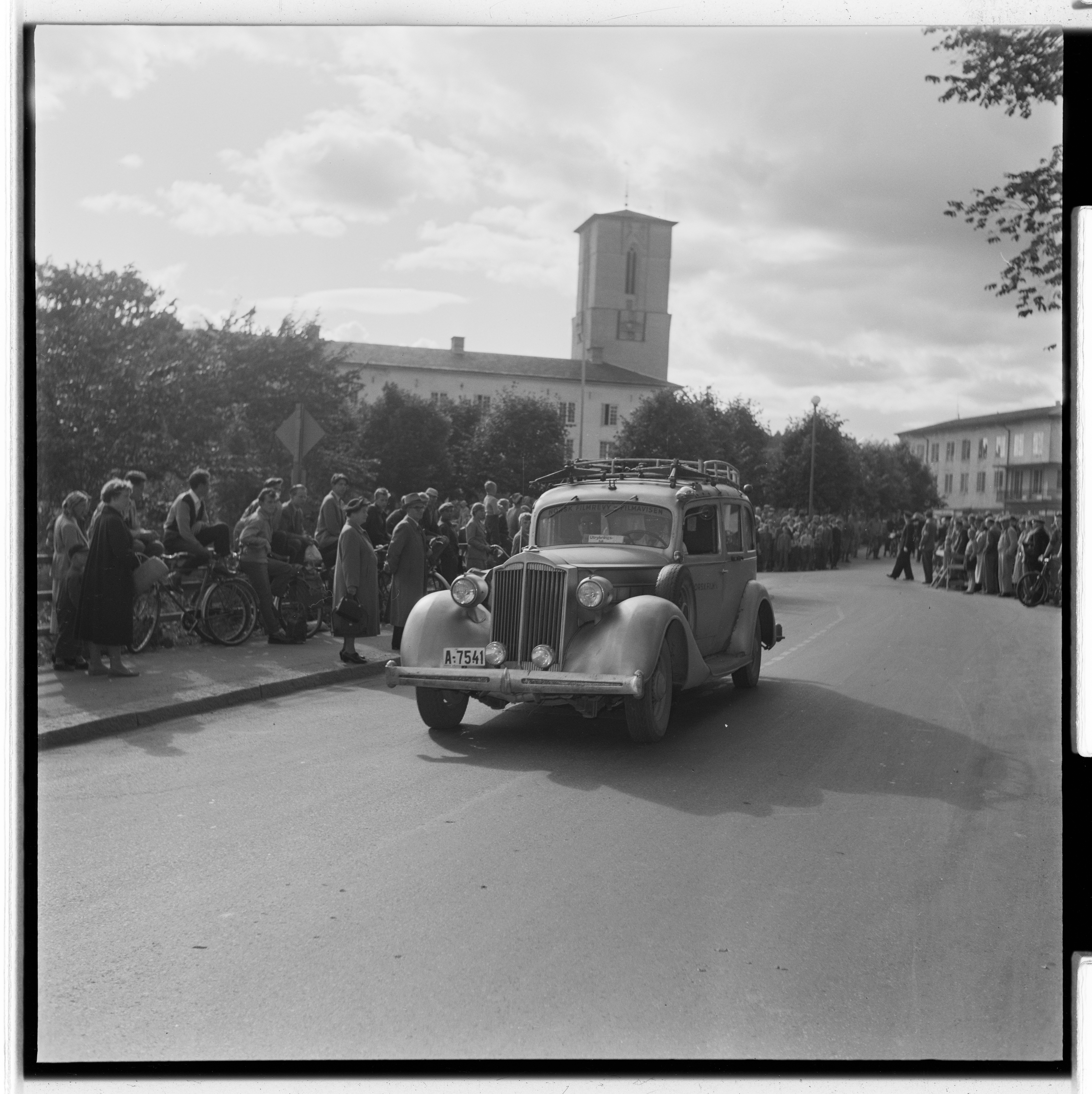 Bildet er hentet fra Arkivverket. Veteranbilklubbens løp Sandvika-Oslo. NÅ nr. 21, 1954 Arkivinstitusjon : Riksarkivet Arkivnavn : Billedbladet NÅ Sted : Norge, Akershus, Bærum, Sandvika Avbildet